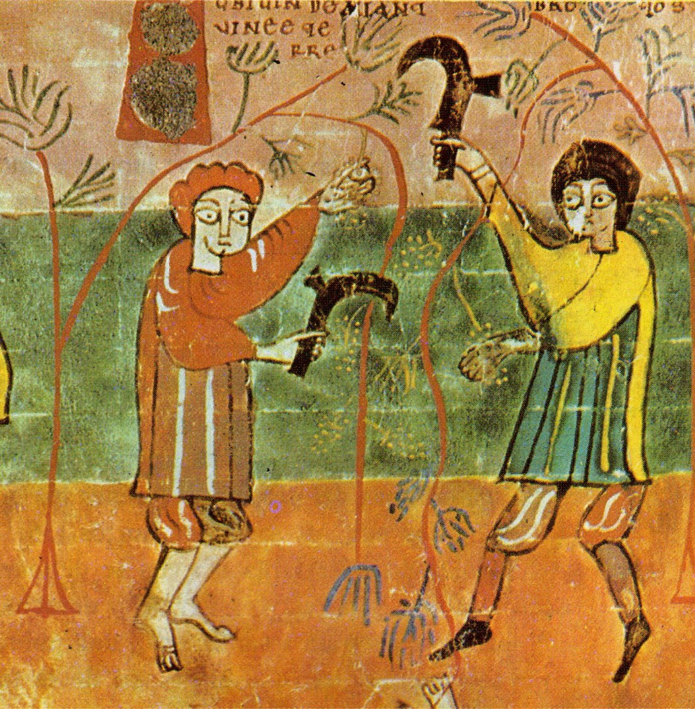 La siega.